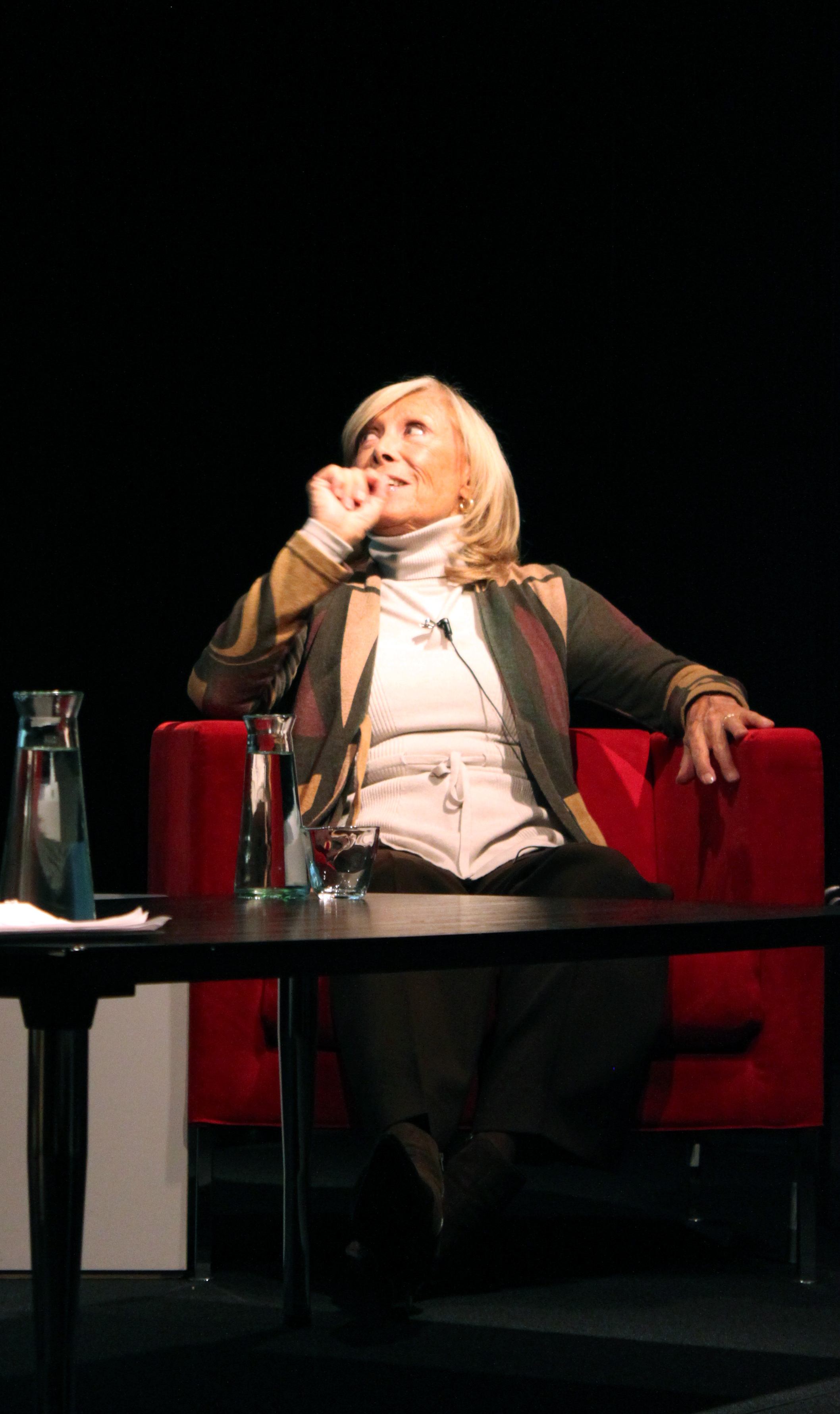 El Día Internacional de la Mujer invitamos a Amelita Baltar, una de las grandes voces del tango argentino, para que nos hable sobre el tango y la vida.